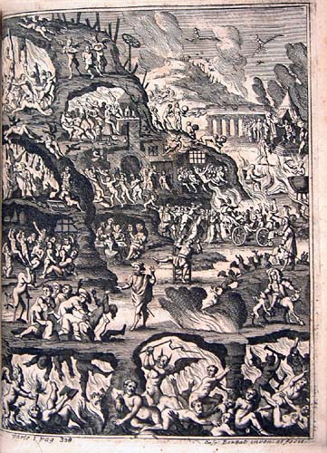 Las zahúrdas de Plutón, Amberes, por Henrico y Cornelio Verdussen.